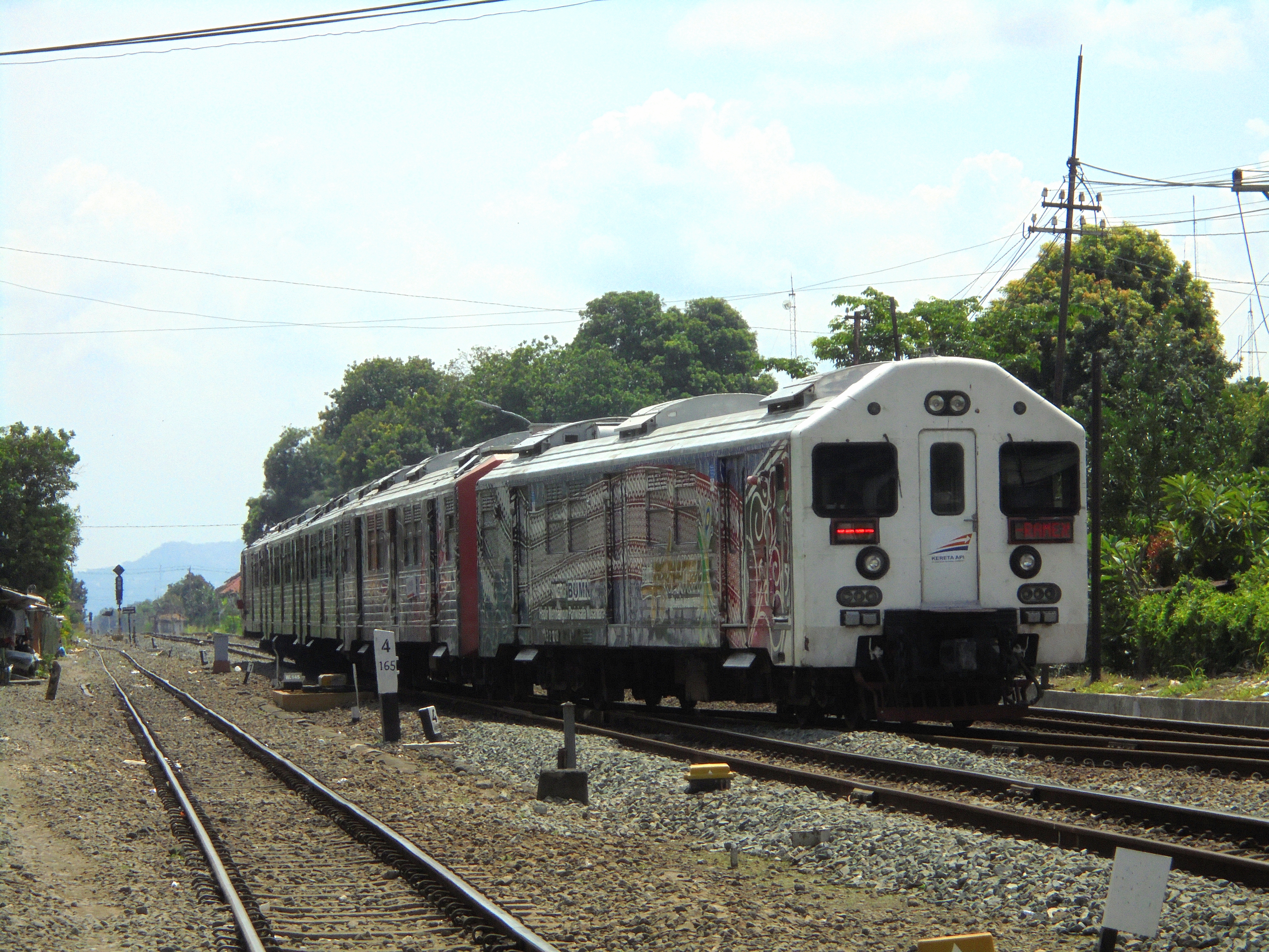 Kereta api Prambanan Ekspres saat akan memasuki Stasiun Lempuyangan